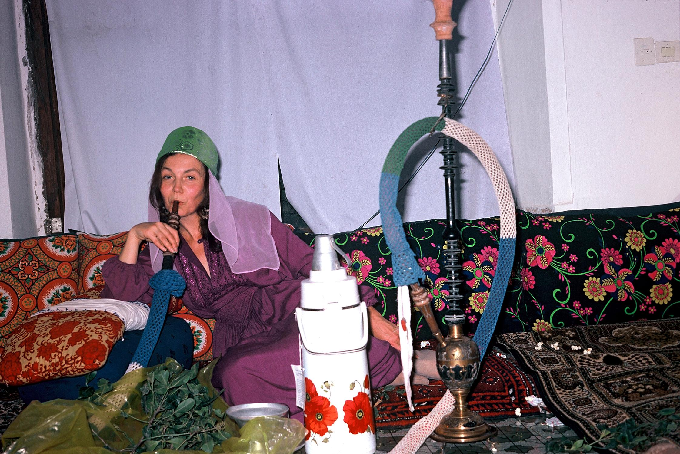 Laurence Deonna fumant le narguilé dans un harem du Yémen.